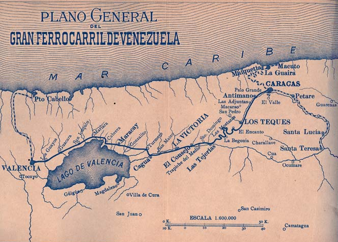 Plano del Gran Ferrocarril de Venezuela (finales del siglo XIX)